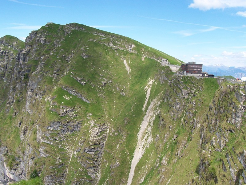 Monte Generoso